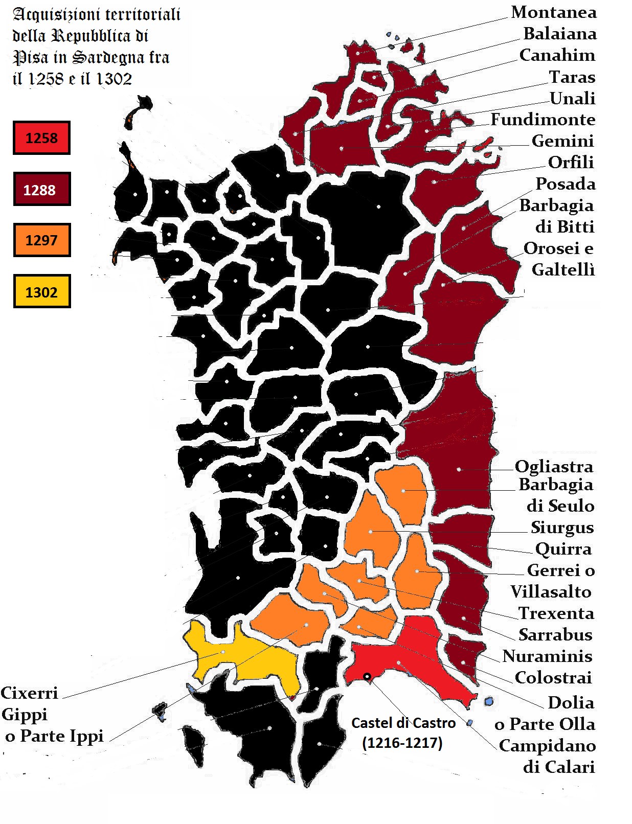 Nelle varie tonalità di rosso : Acquisizioni territoriali della Repubblica di Pisa in Sardegna fra il 1258 e il 1302